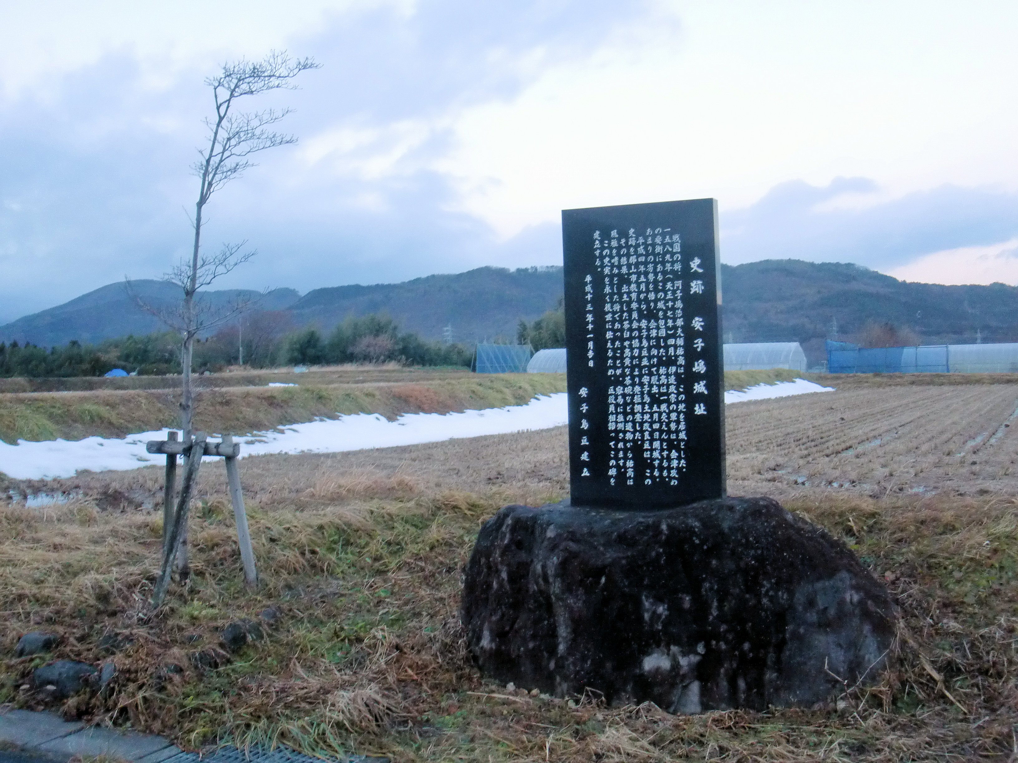 福島県郡山市熱海町 安子島城址